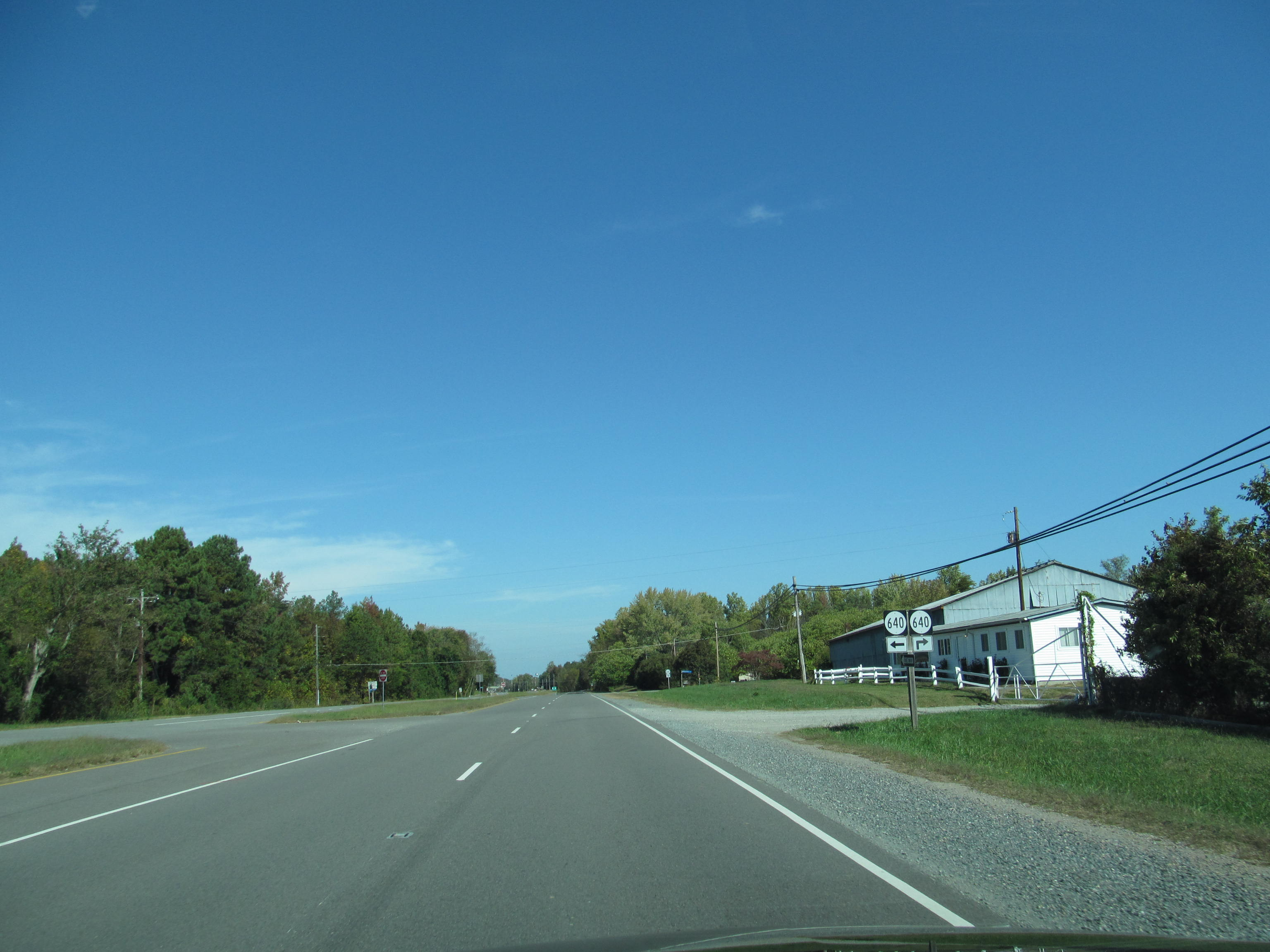 US Route 301 - Virginia